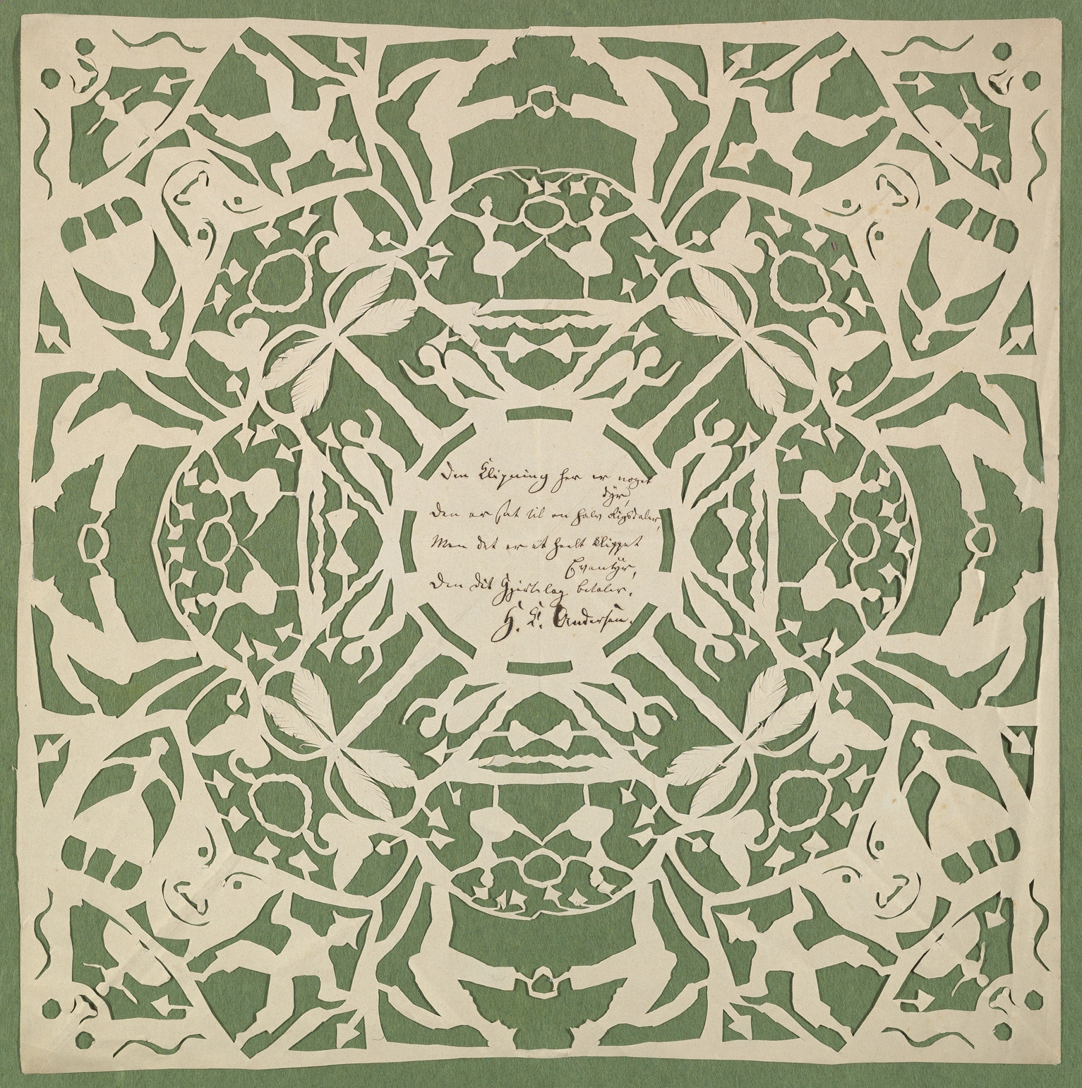 Cut paper; Cut Paper